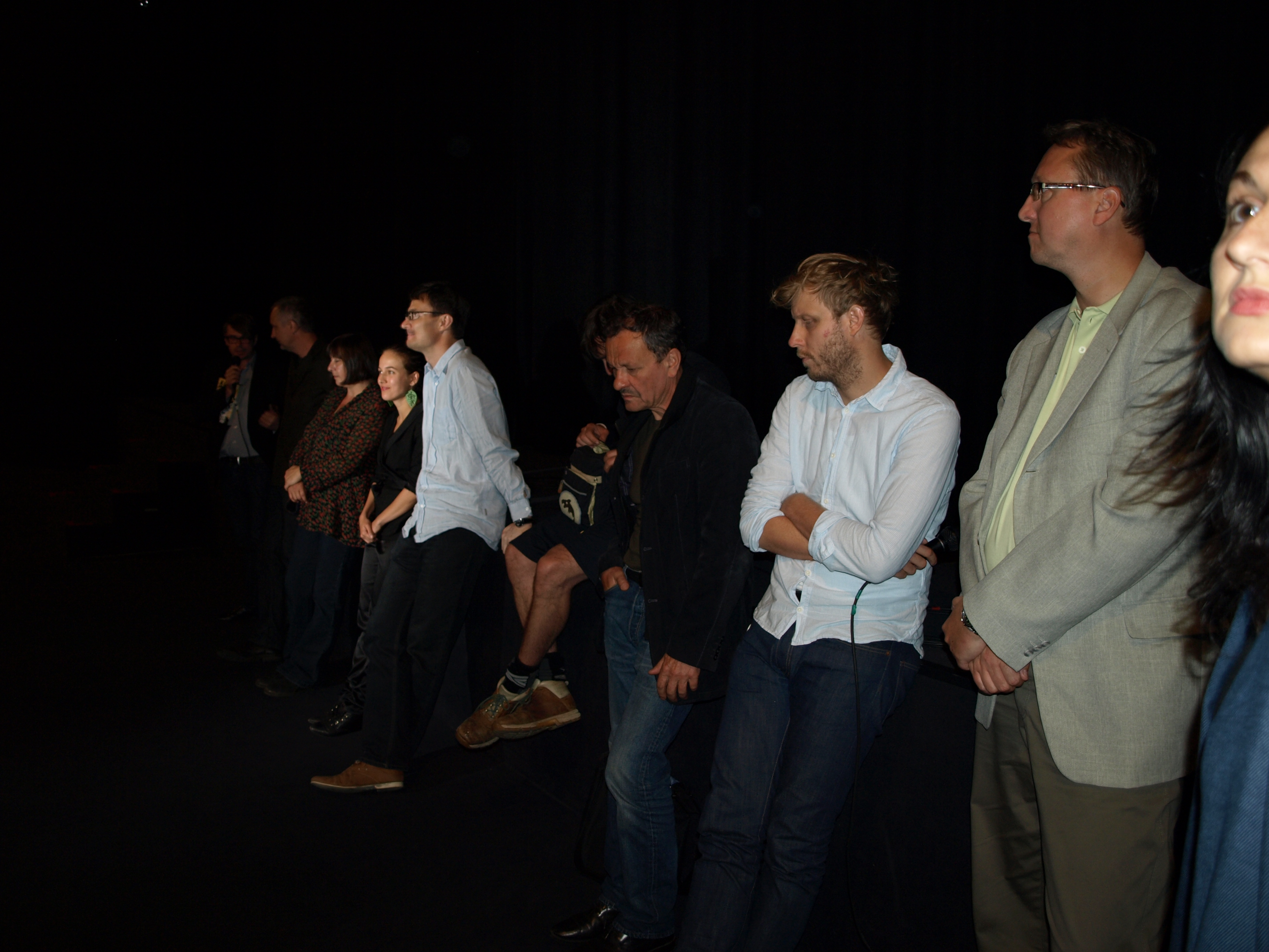 Novinářská projekce filmu Alois Nebel